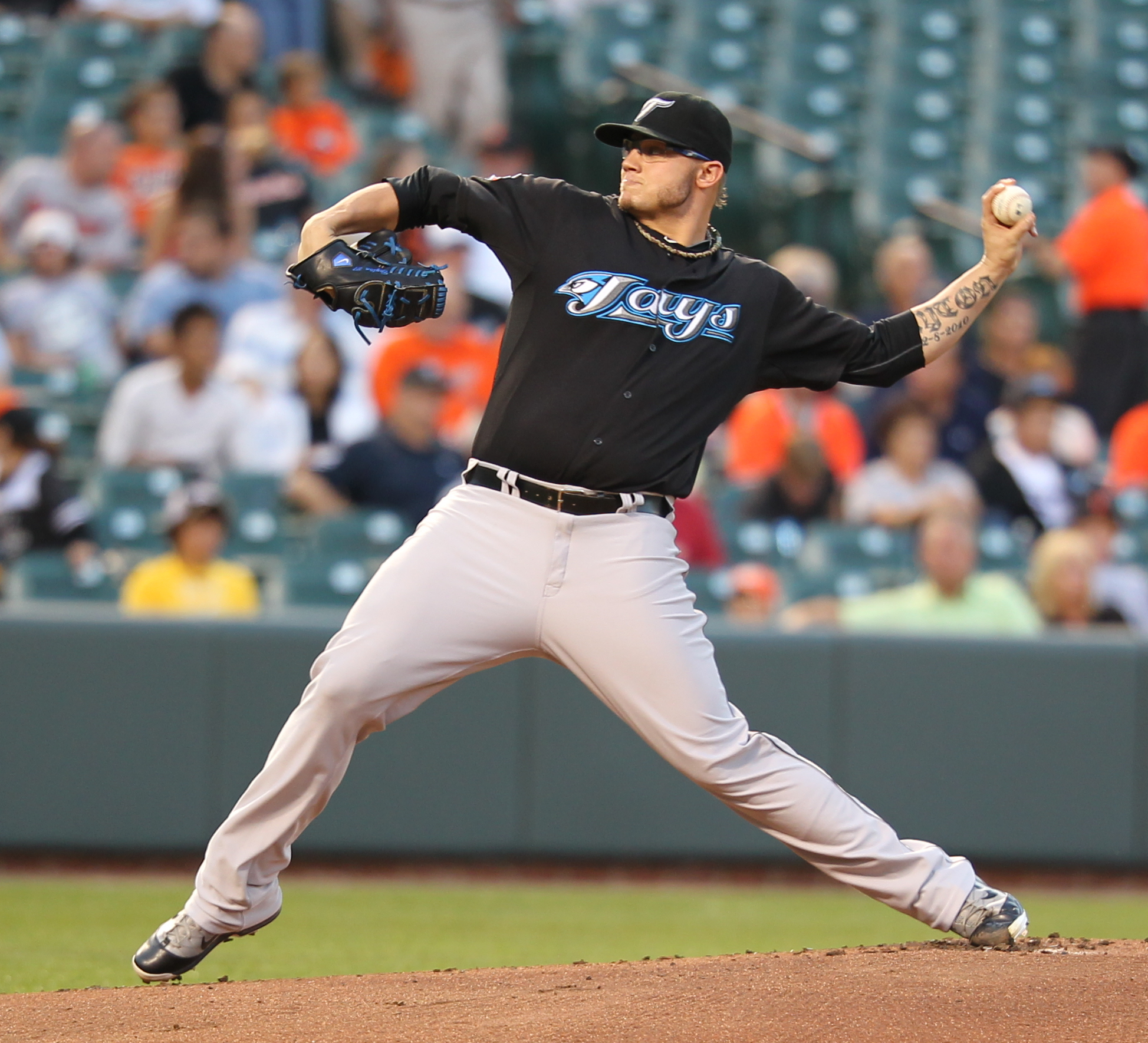 Brett Cecil